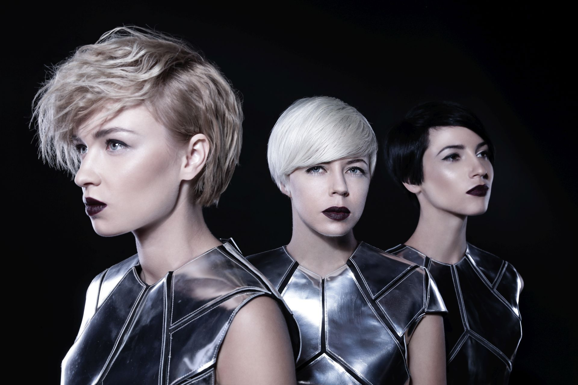 Фотосесія до нового альбому